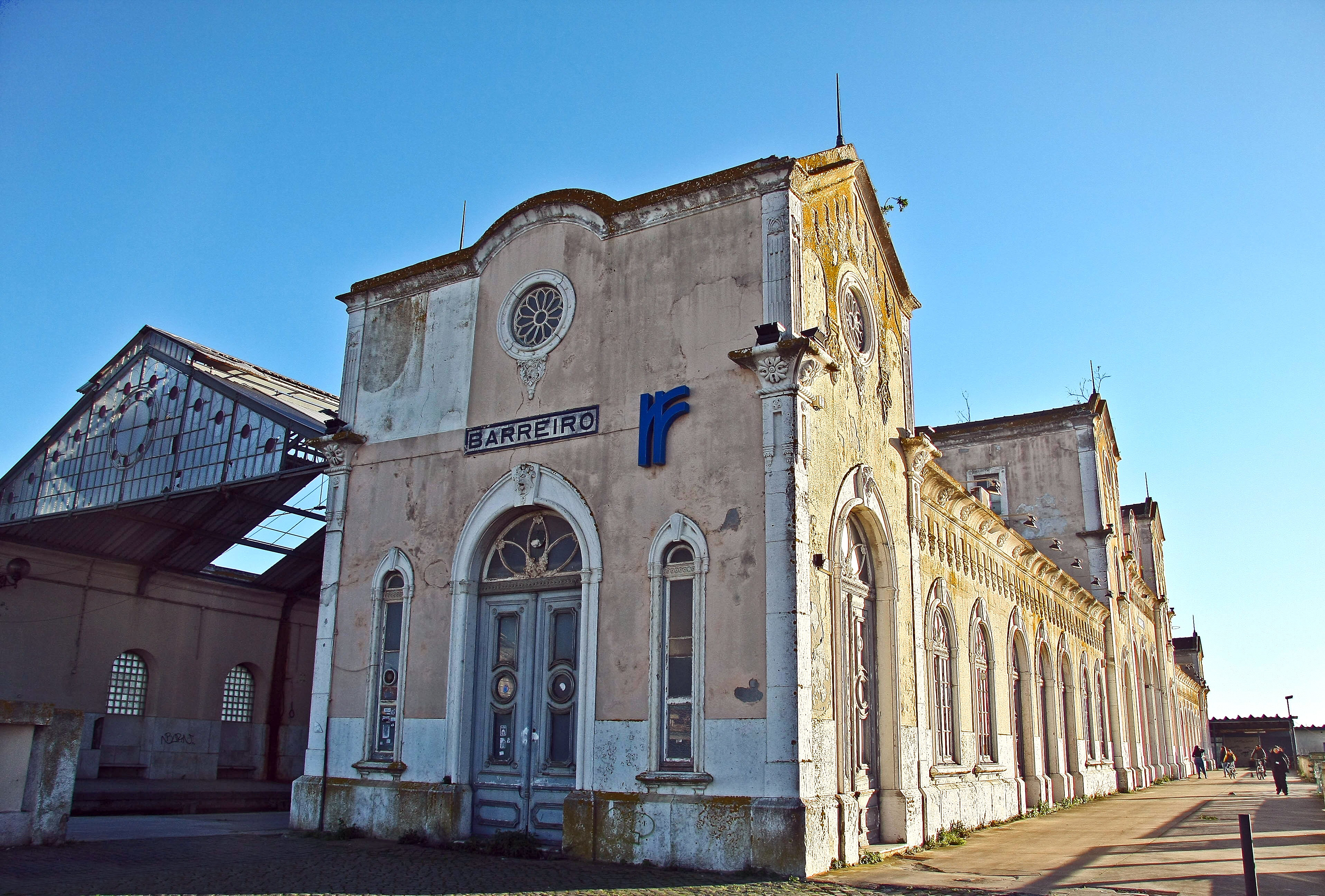 Antiga Estação da CP - Barreiro - Portugal 🇵🇹